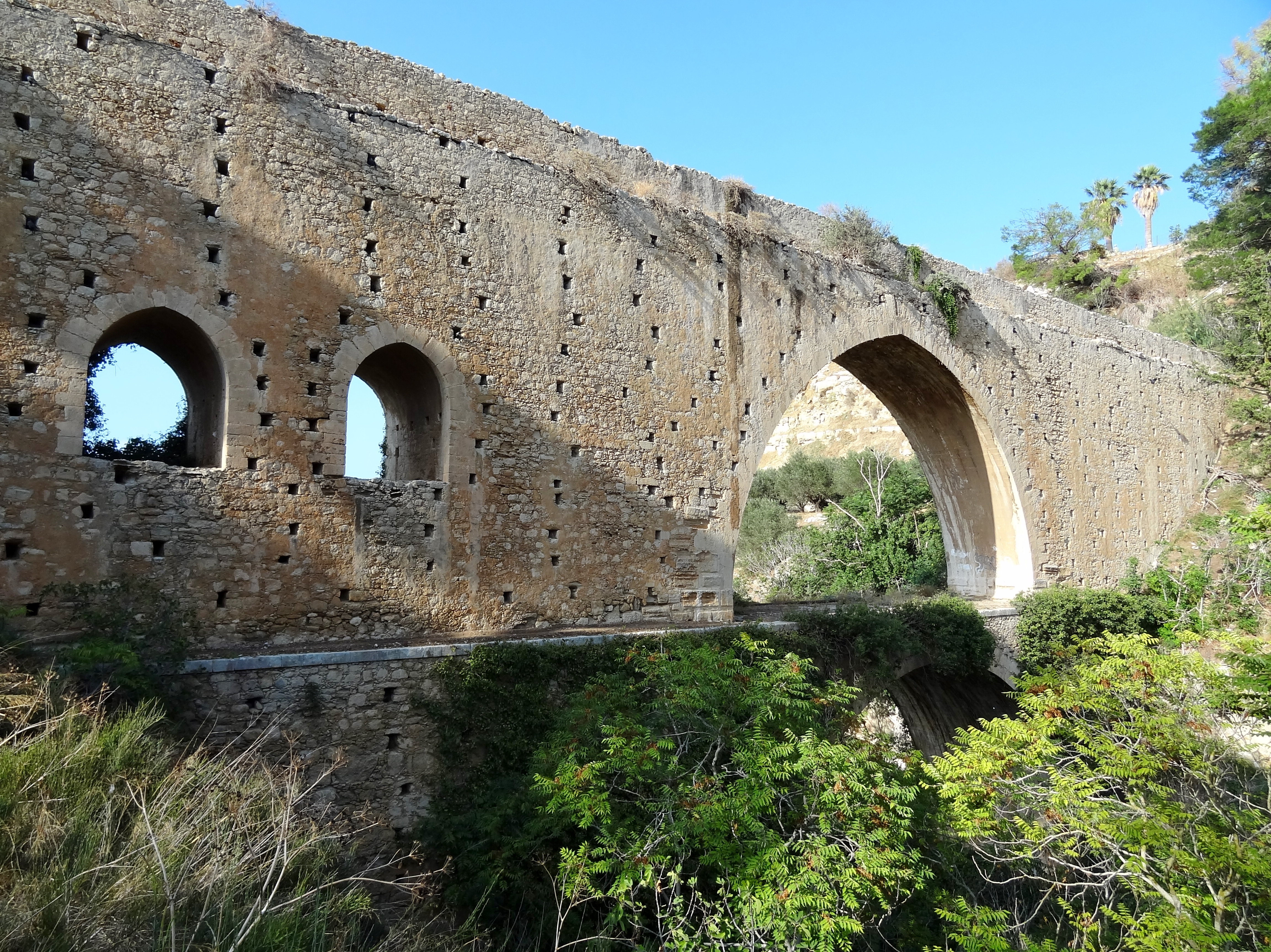 Ägyptisch-osmanisches Aquädukt von Agia Irini bei Spilia (Bauzeit 1839–1843) südlich von Knossos, Gemeinde Iraklio, Kreta, Griechenland